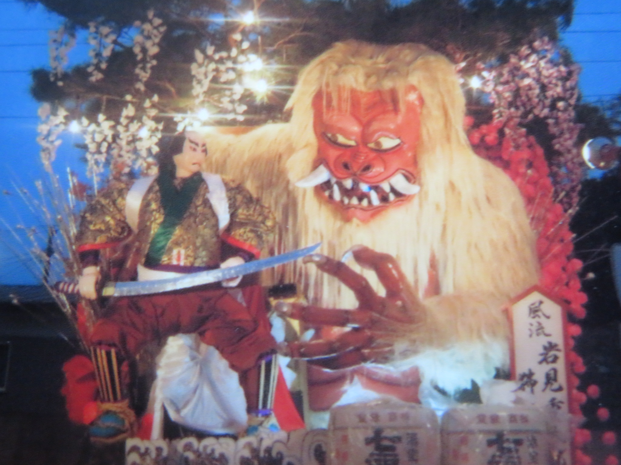 葛巻・浦子内組山車。